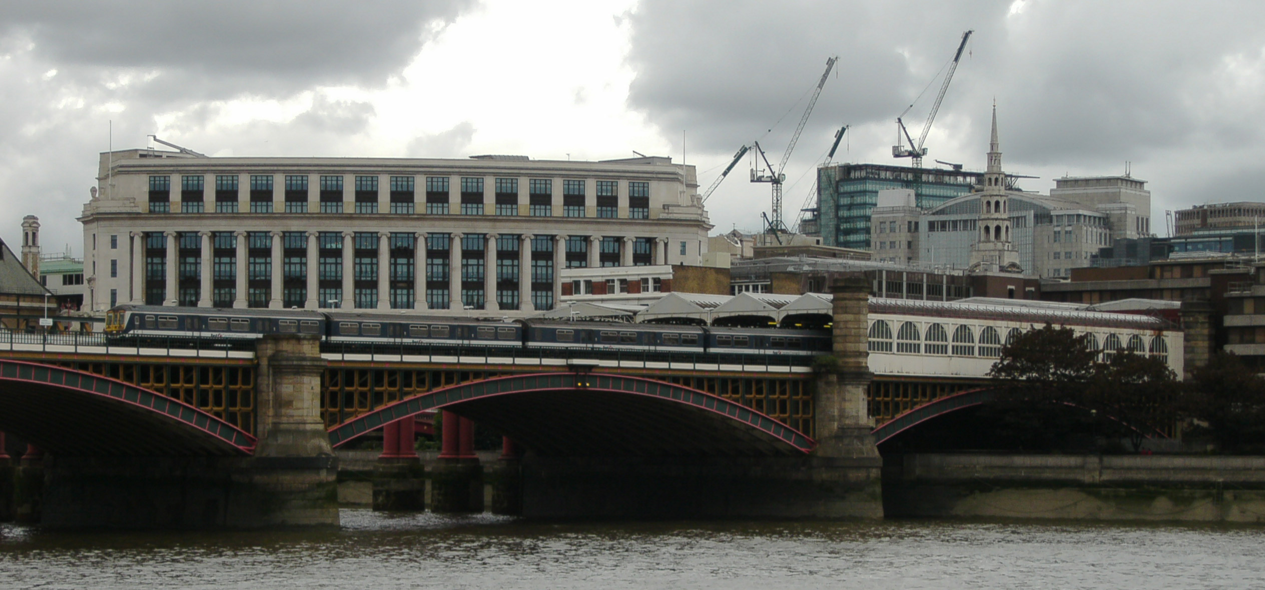 Blackfriars Station und Blackfriars Bridge von Südosten aus gesehen mit Zug von First Capital Connect